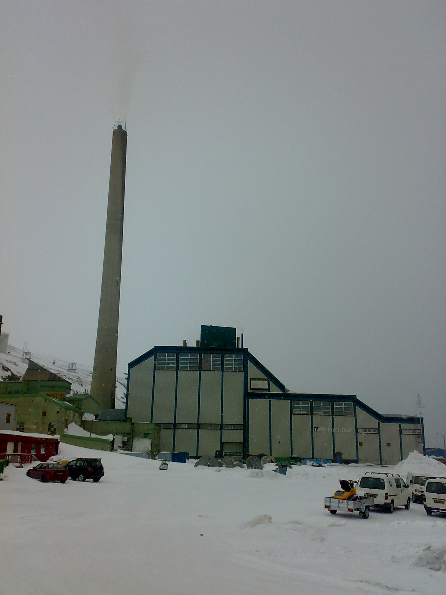 Bydrift kullkraftverk, Longyearbyen